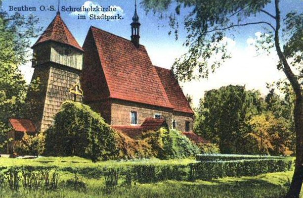 Park Miejski - pocztówka z ok. 1930 r.